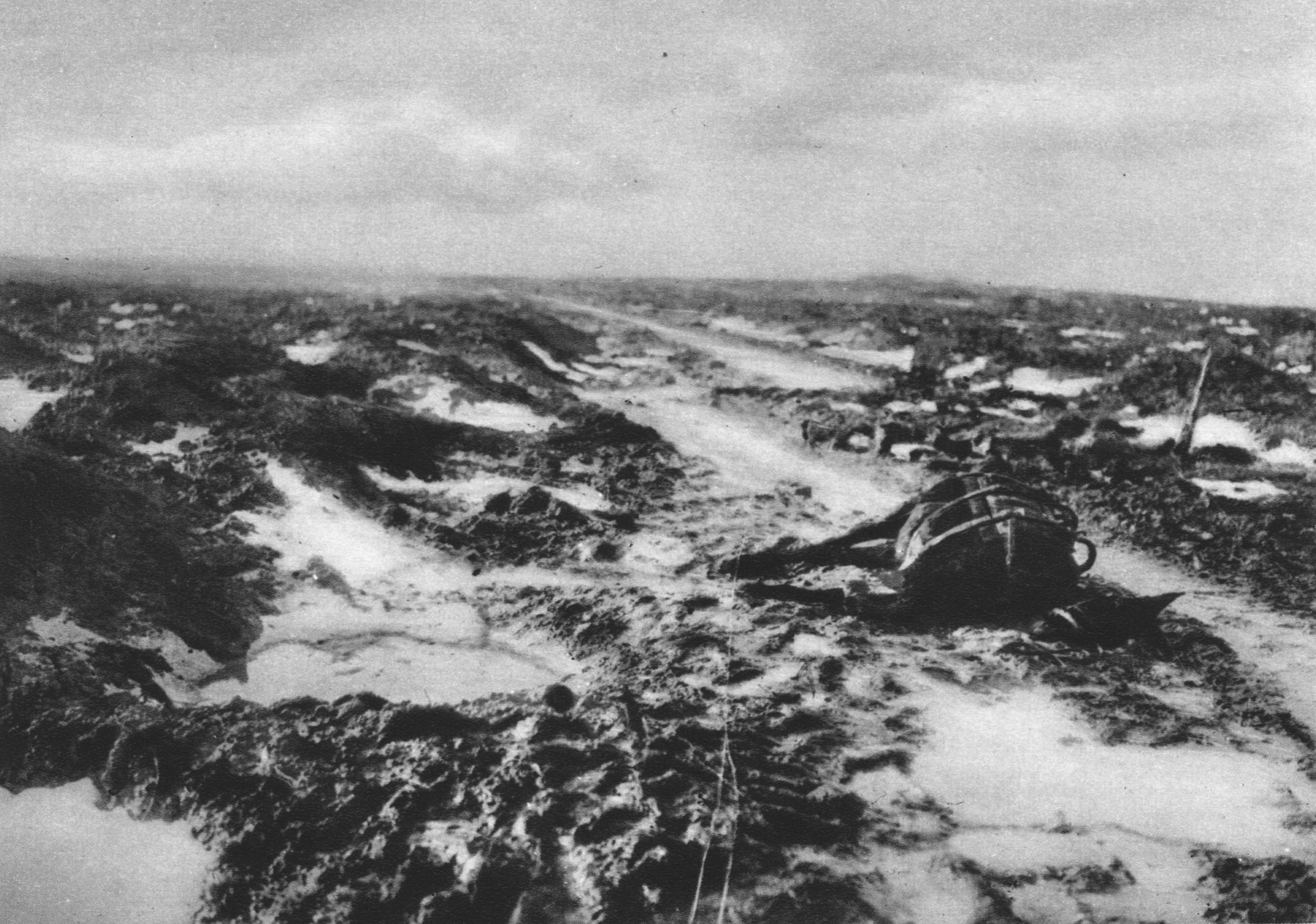 Gelände bei Passchendale